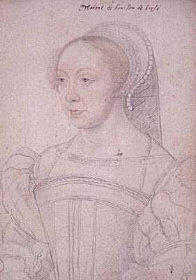 Portrait de Francoise de Breze (v.1519-74) v.1550